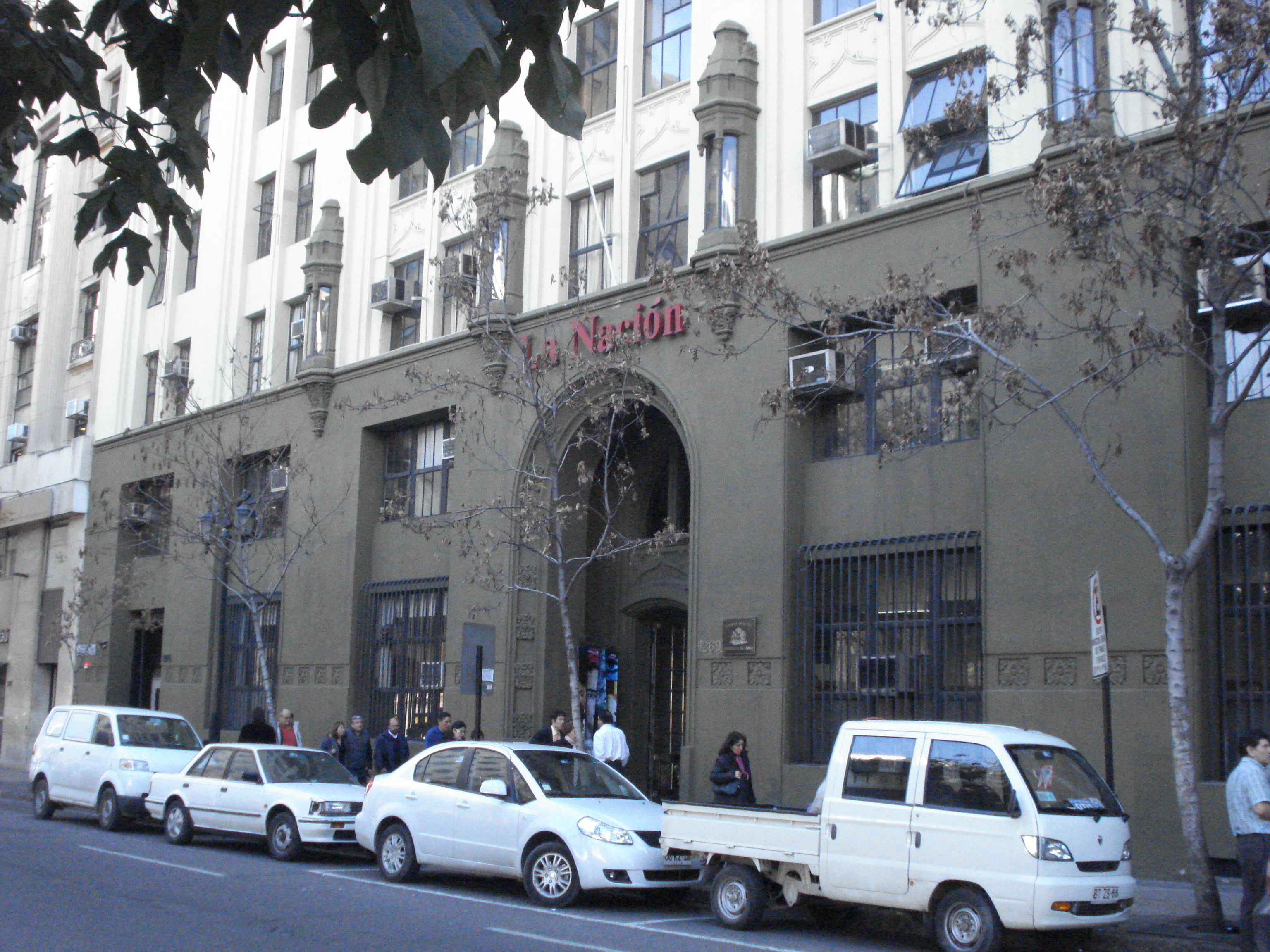 Edificio que albergó al diario La Nación, Agustinas n.° 1269, Santiago de Chile (2010).